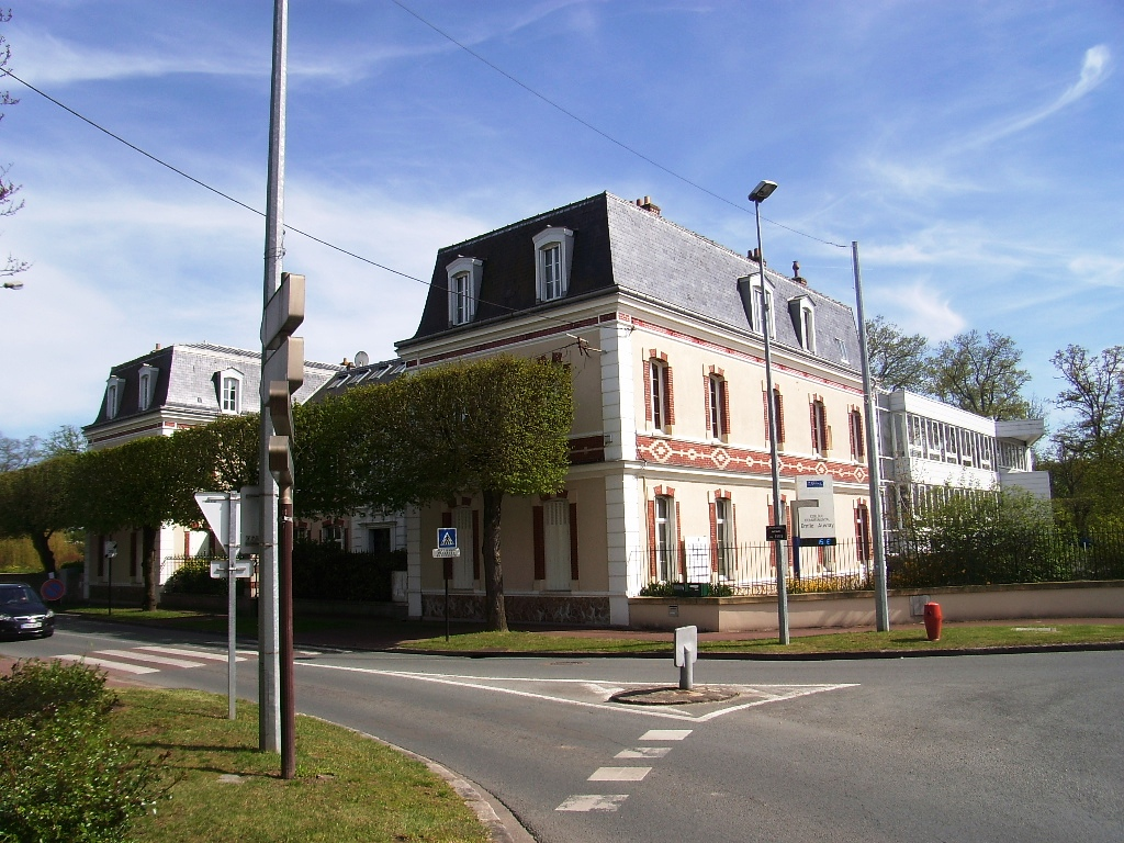 Collège Emile Auvray de Dourdan